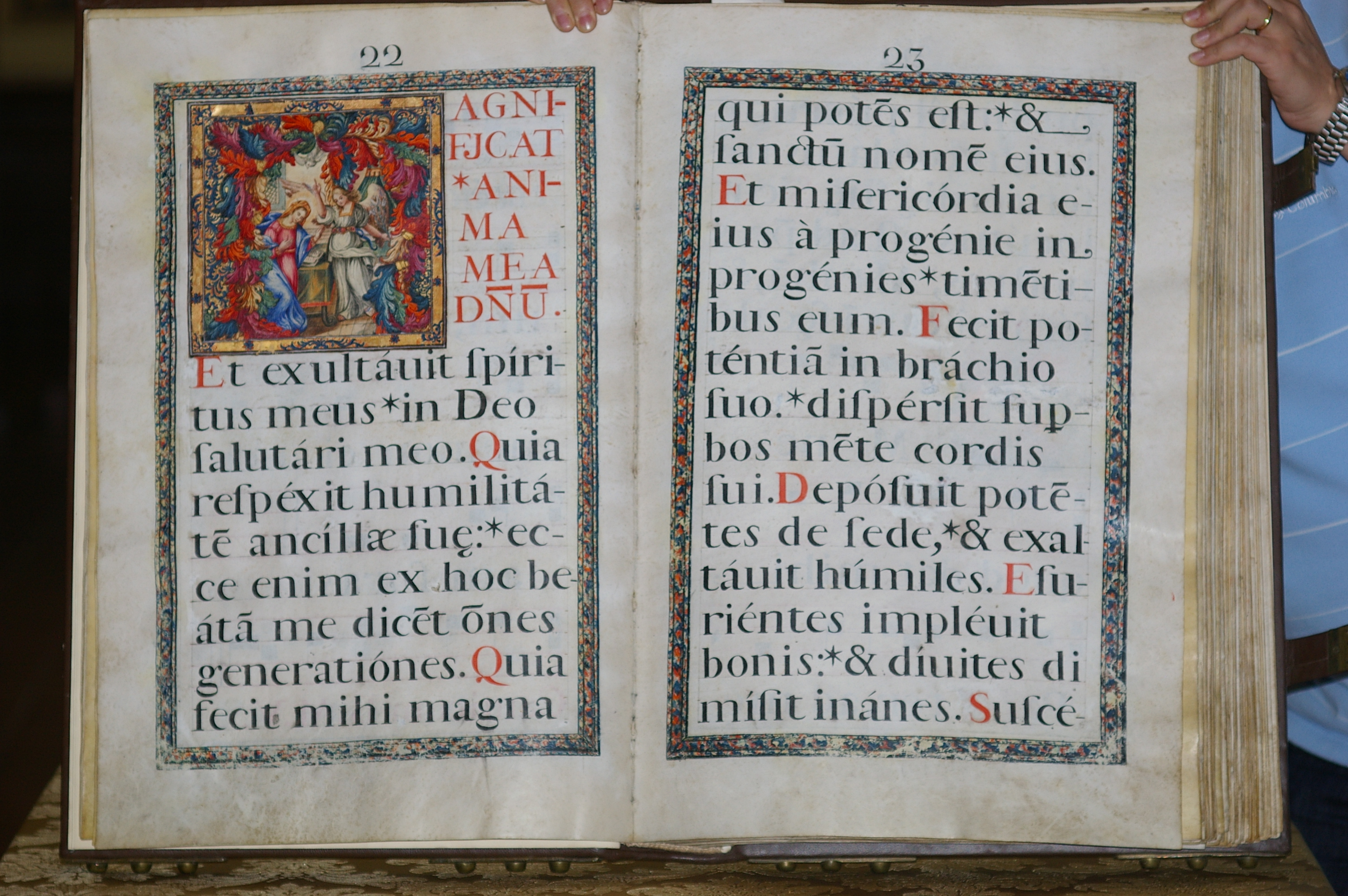 Biblioteca Santuario francescano, Cava de' Tirreni - Libro corale